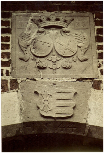 Oben: Das Ehewappen von Brachel – von Hompesch 1736. Zwei nebeneinandergestellte Schilde unter einer Adelskrone. Der ranghöhere Schild des Ehegatten, Freiherr Friedrich Theodor Egide von Brachel, steht als Oberwappen heraldisch rechts. Er zeigt einen Turnierkragen mit drei Lätzen. Der Schild der Ehegattin, Anne-Marie von Hompesch, trägt ein gezahntes Andreaskreuz. Unten: Das Ehewappen von Bock – von Goltstein 1544. Die Allianz wird in einem gespaltenen Schild präsentiert. Heraldisch rechts das Wappen des Colyn von Bock, es zeigt einen Lilienzepterstern, auch Lilienrad, Karfunkelstern oder Wappenkarfunkel genannt. Das Wappen der Gattin, N. von Goltstein, stellt einen Schild mit vier Querbalken dar.